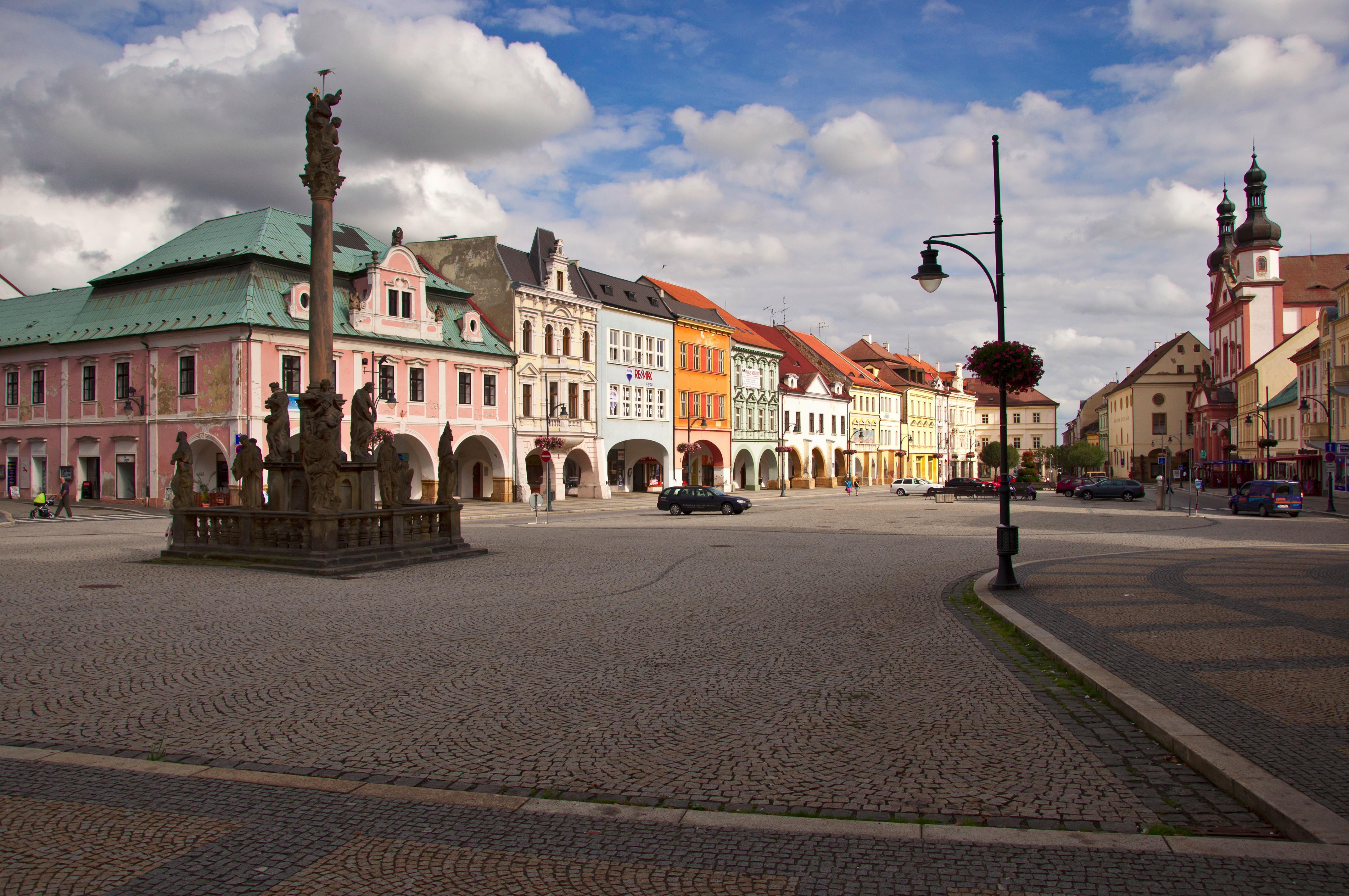 Sloup se sousoším Nejsvětější Trojice (Chomutov), 1. máje, Chomutov